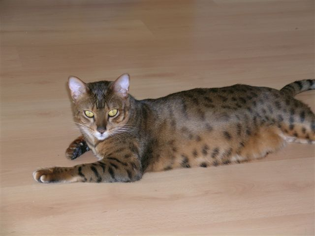 Meine Bengal-Katze Camille im Alter von 1,5 Jahren, Zeichnung Black Tabby Spotted